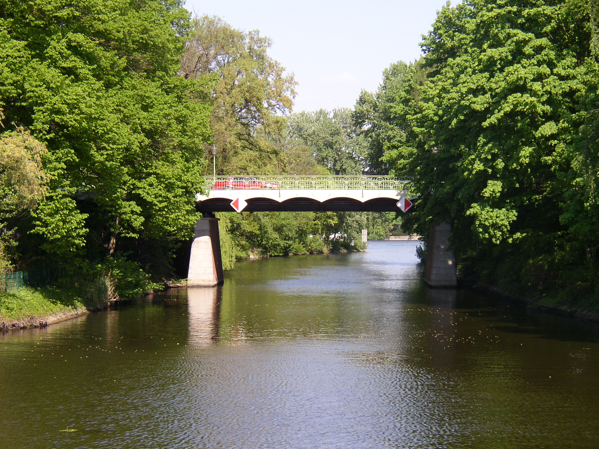 Die Alsenbrücke über den Griebnitzkanal (Prinz-Friedrich-Leopoldkanal) in Berlin-Wannsee.